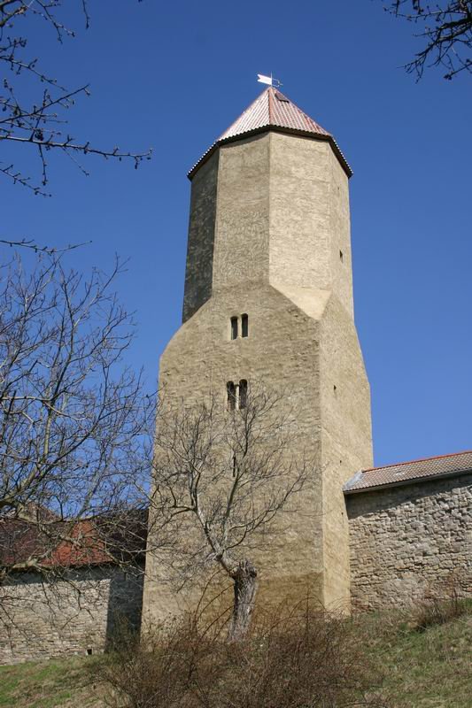 Freckleben, eigenes Foto, public domain, Bergfried von 1200, Mewes